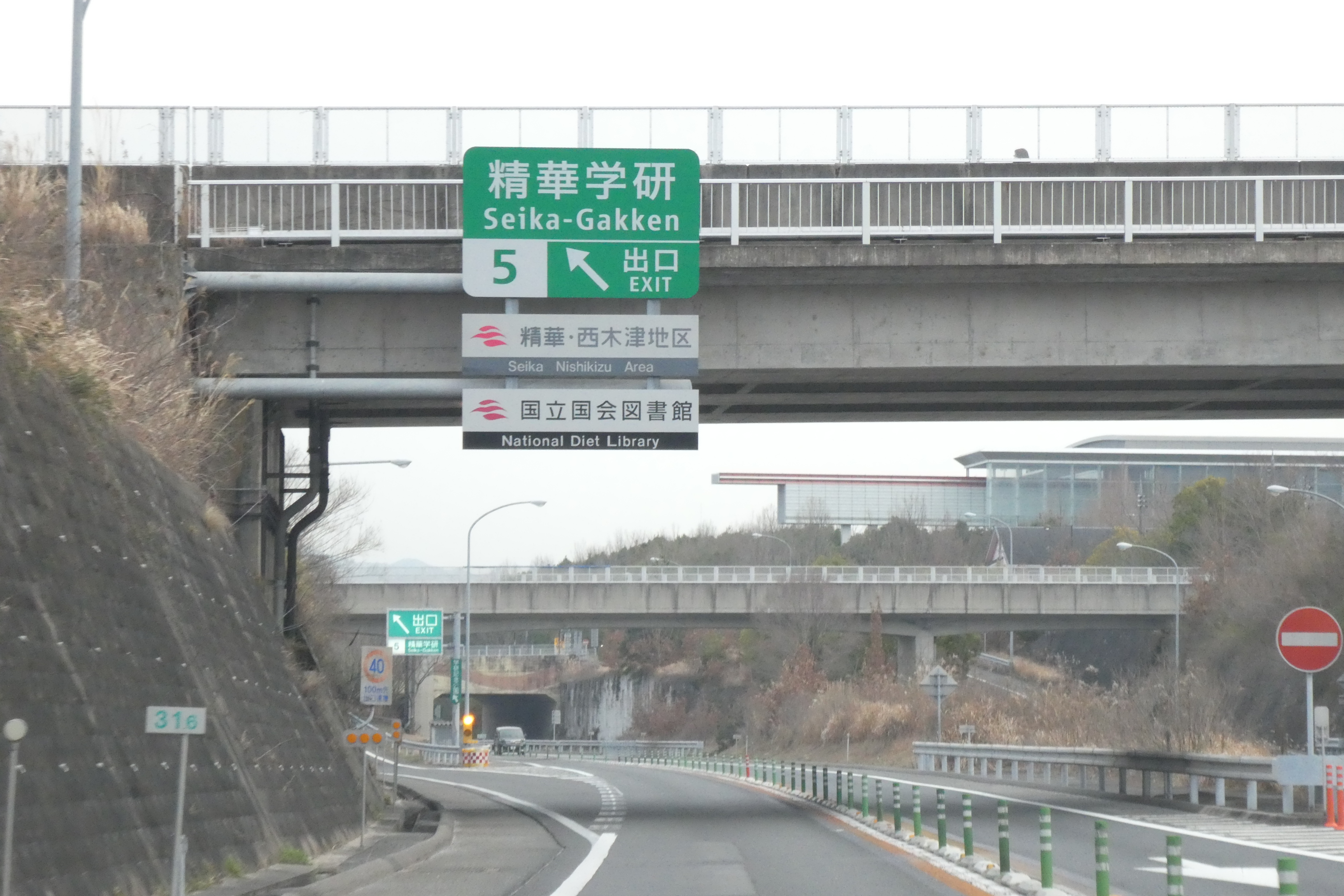 精華学研インターチェンジ